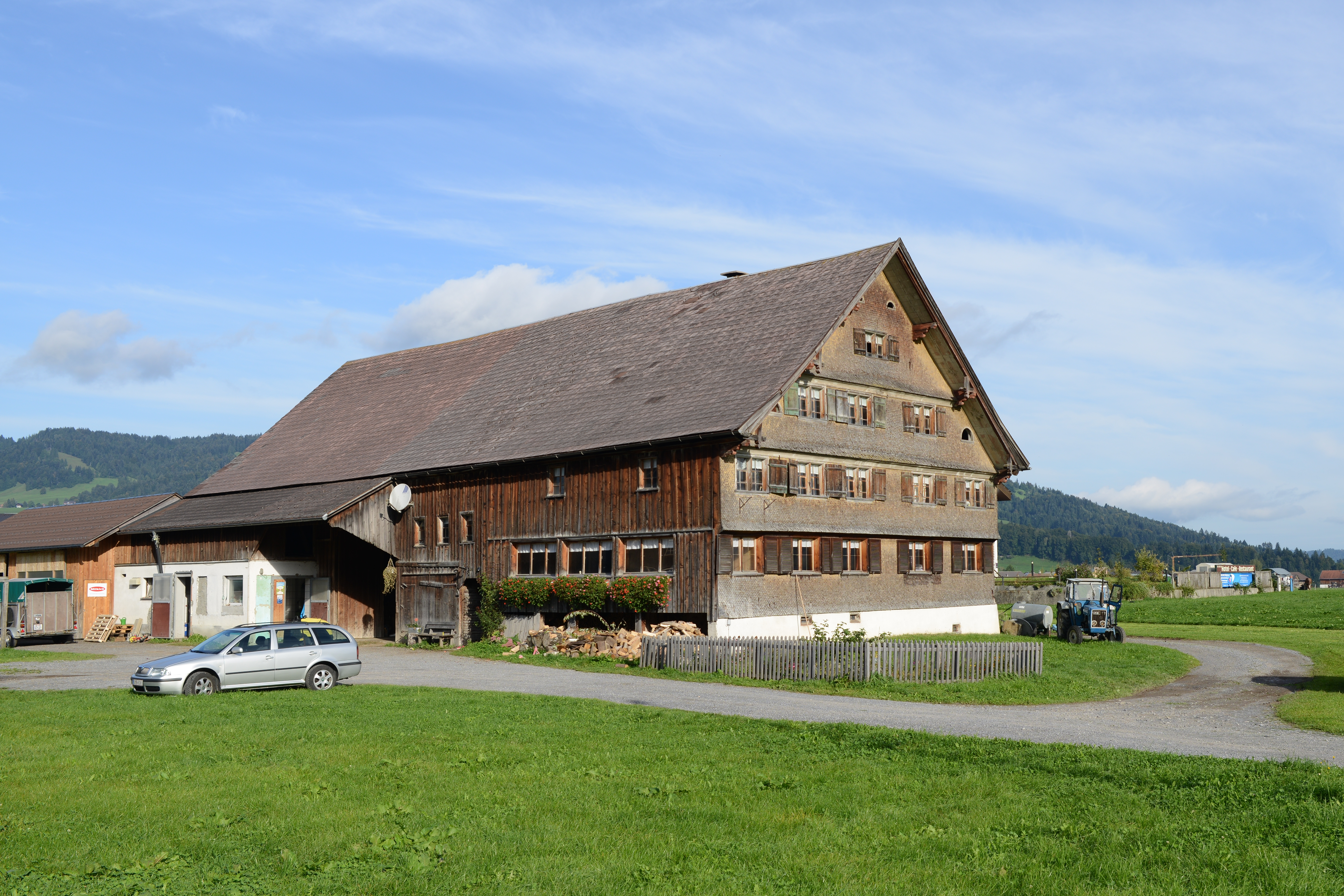 Bauernhof (Anlage) in Hof 134, Andelsbuch.